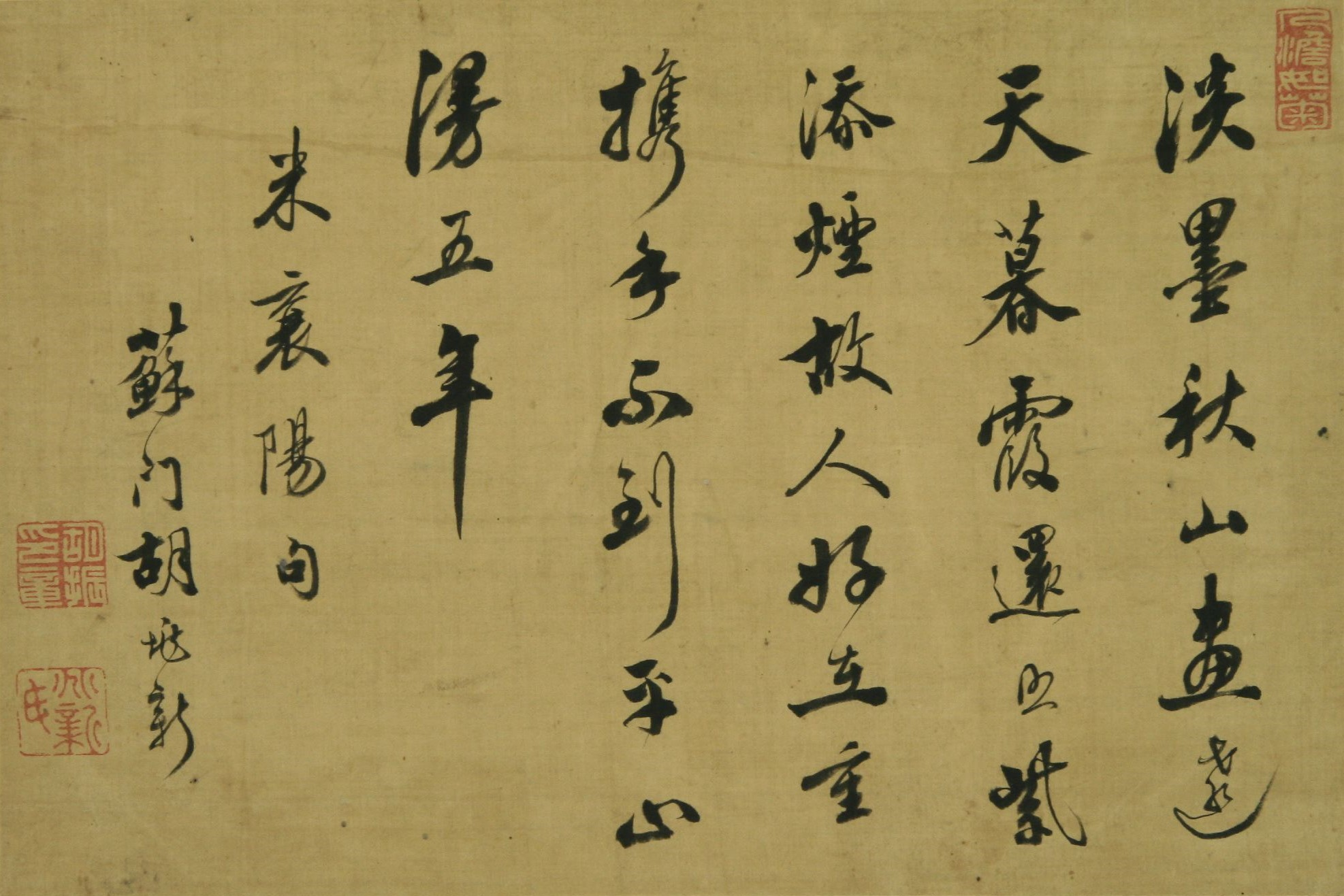 蘇門胡兆新「米襄陽句」 『諸家筆蹟』 早稲田大学図書館